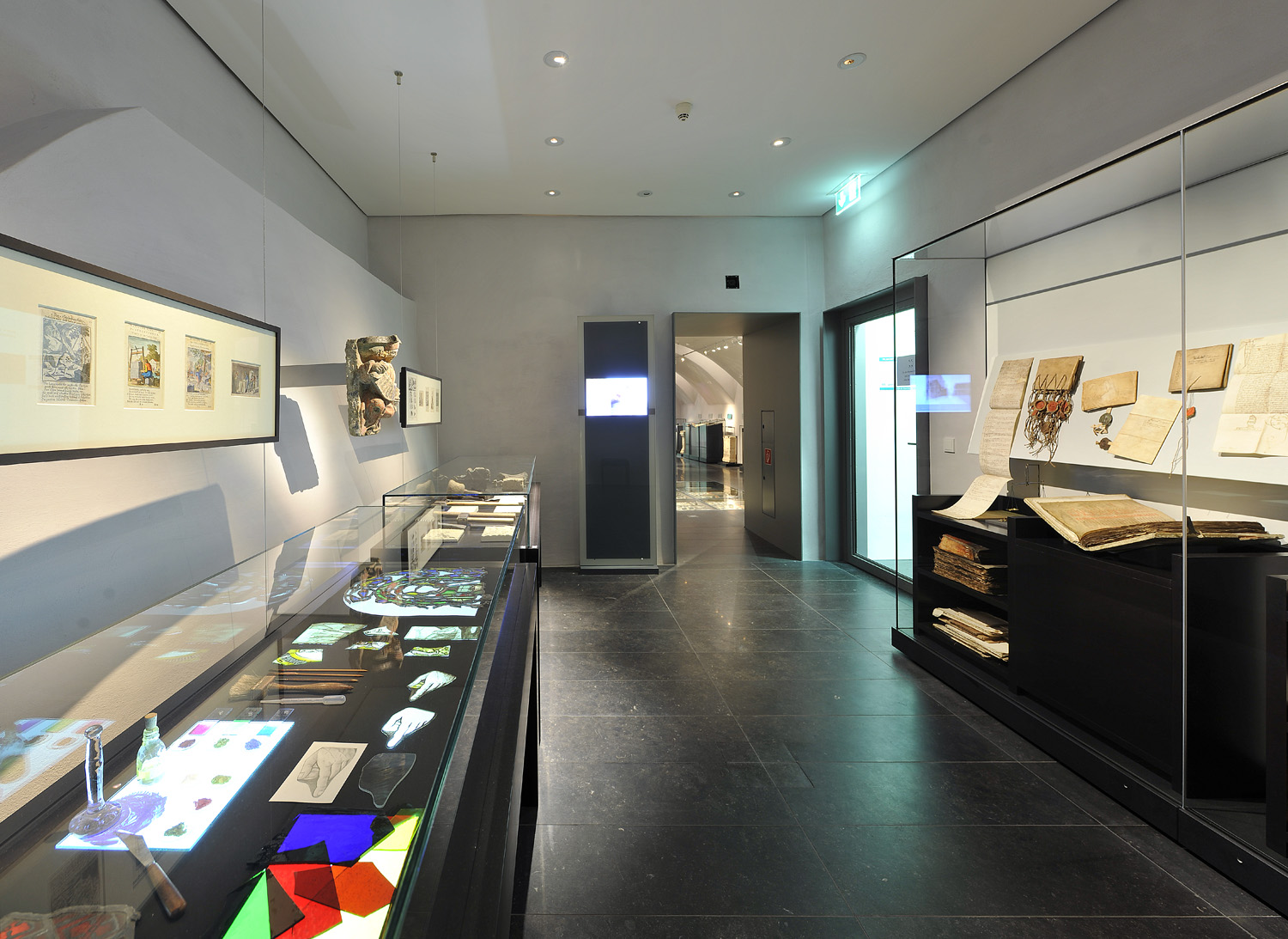 StiftsMuseum Xanten, Raum 2